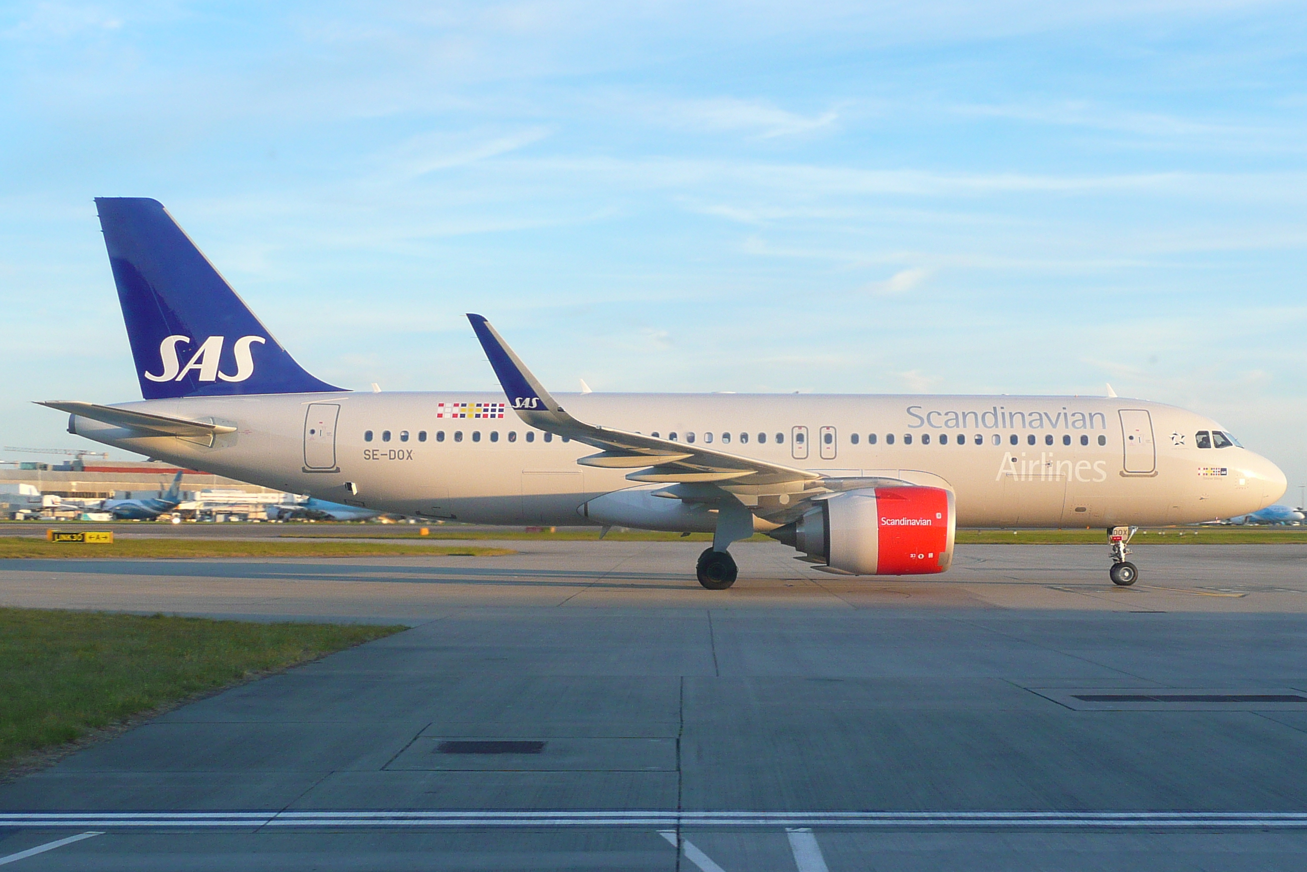 SE-DOX 21052017LHR